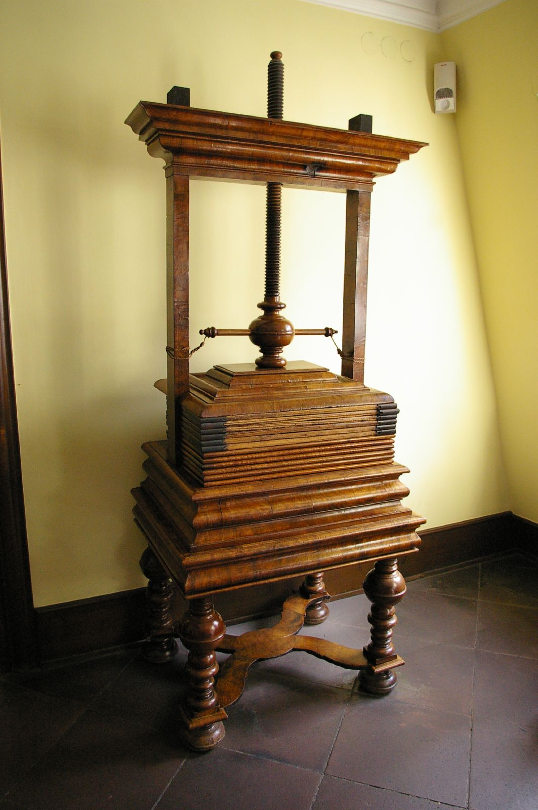 Pressoir à linge, vestibule du troisième étage de la maison de Goethe à Francfort.